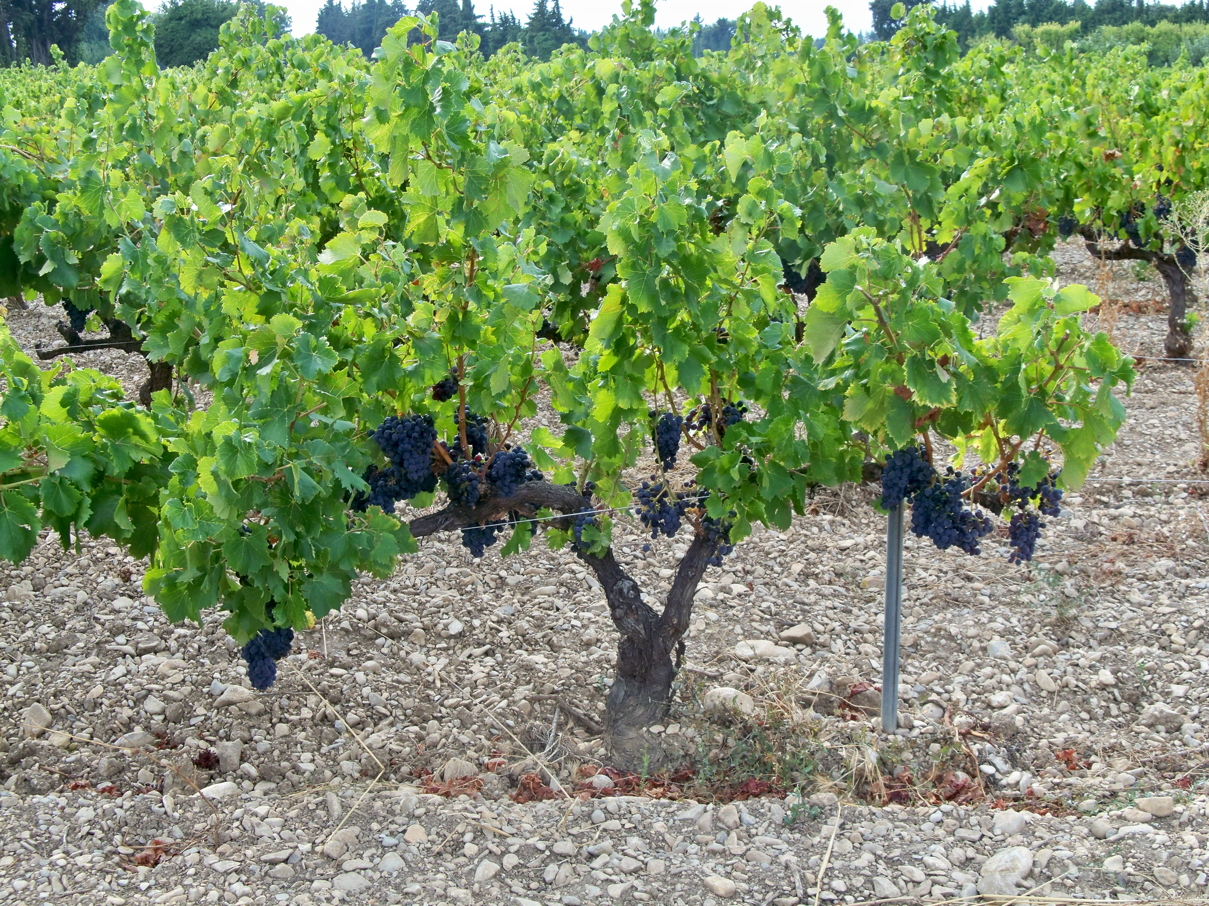 vigne à Vacqueyras (Vaucluse, France)